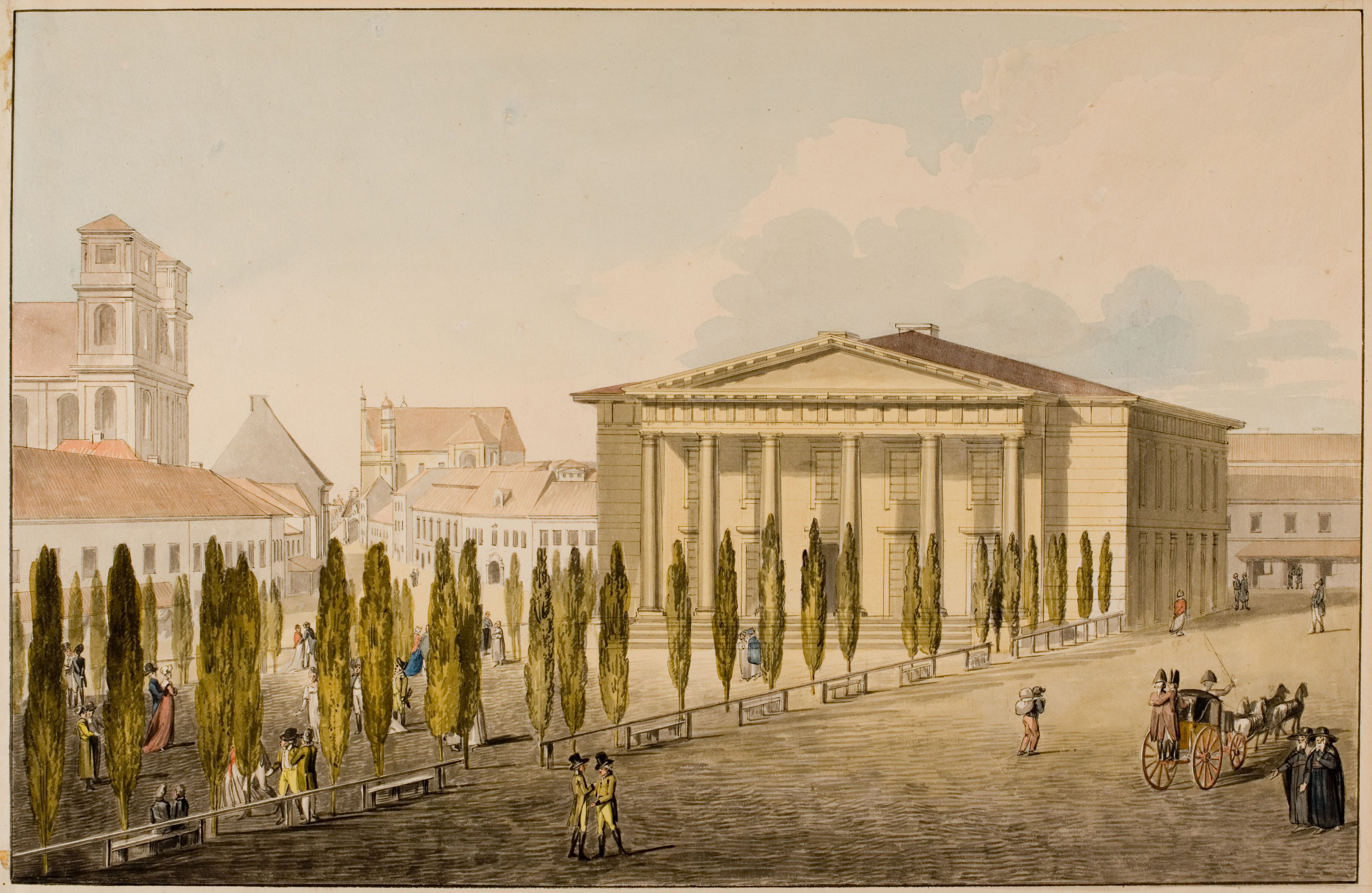 Беларуская (тарашкевіца): Віленская ратуша